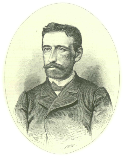 Grabado de Eugenio Montero Ríos, político español, en La Ilustración Española y Americana